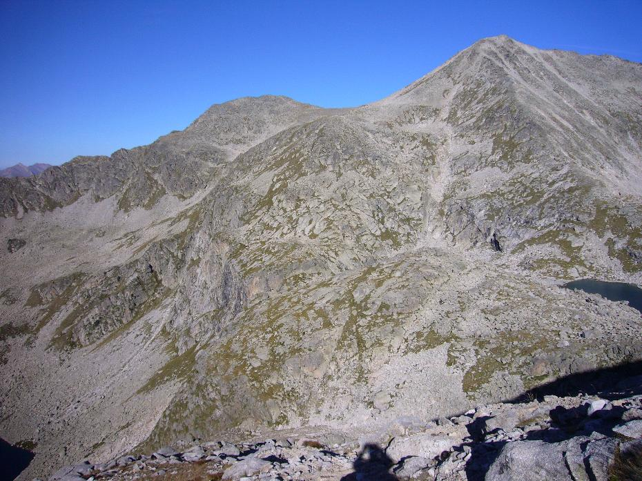 Pic de Baserca i Punta Senyalada vistos des de la Serra Plana; la Vall de Boí, Alta Ribagorça, Catalunya